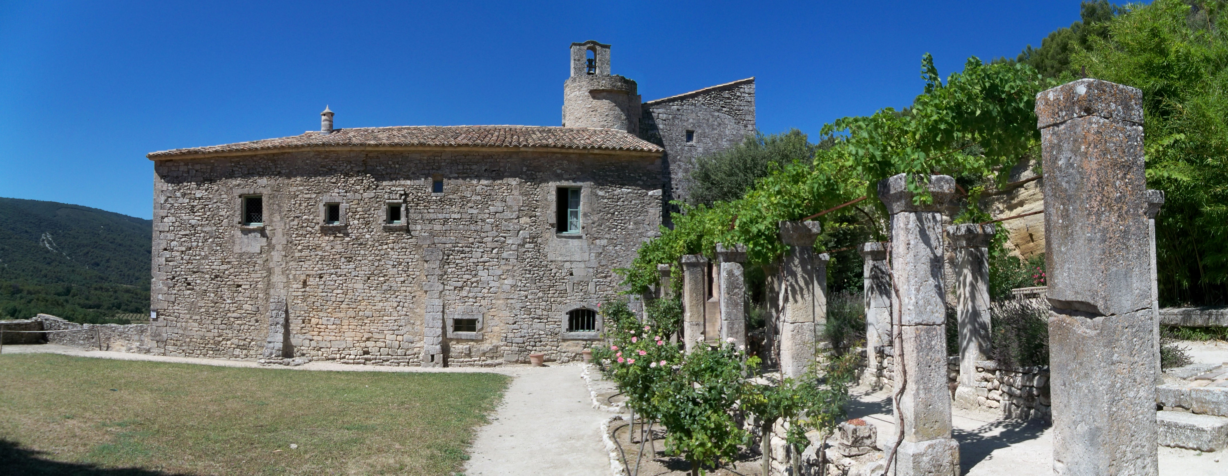 Treille à l'abbaye de Saint Hilaire de Ménerbes, Vaucluse, France